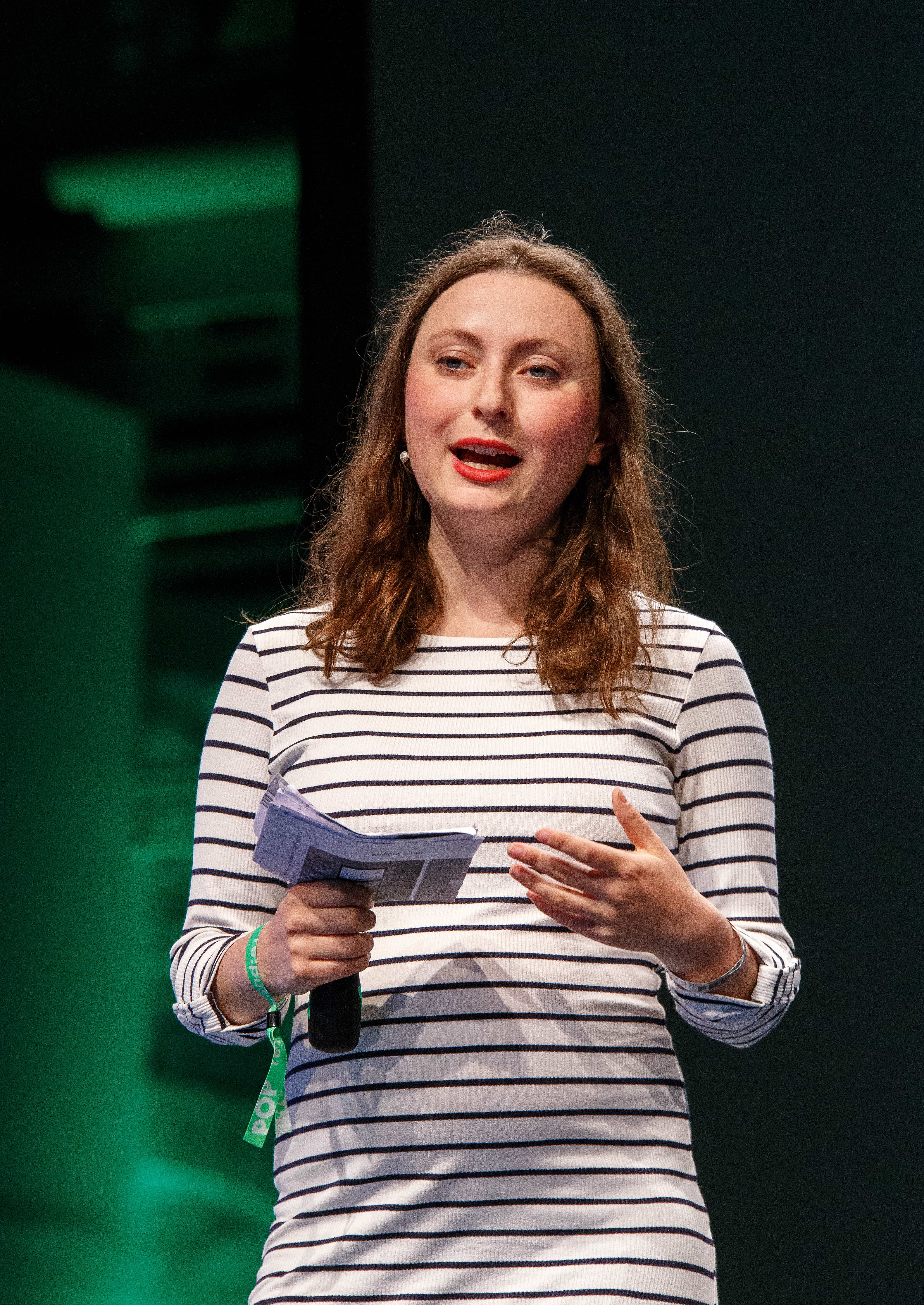 04.05.2018, Berlin: Talk: Vom Instagram-Hippie zum echten Öko-Aktivisten mit Zero Waste Speaker: Milena Glimbovski Die re:publica ist eine der weltweit wichtigsten Konferenzen zu den Themen der digitalen Gesellschaft und findet in diesem Jahr vom 02. bis 04. Mai in der STATION-Berlin statt. Foto: Jan Michalko/re:publica